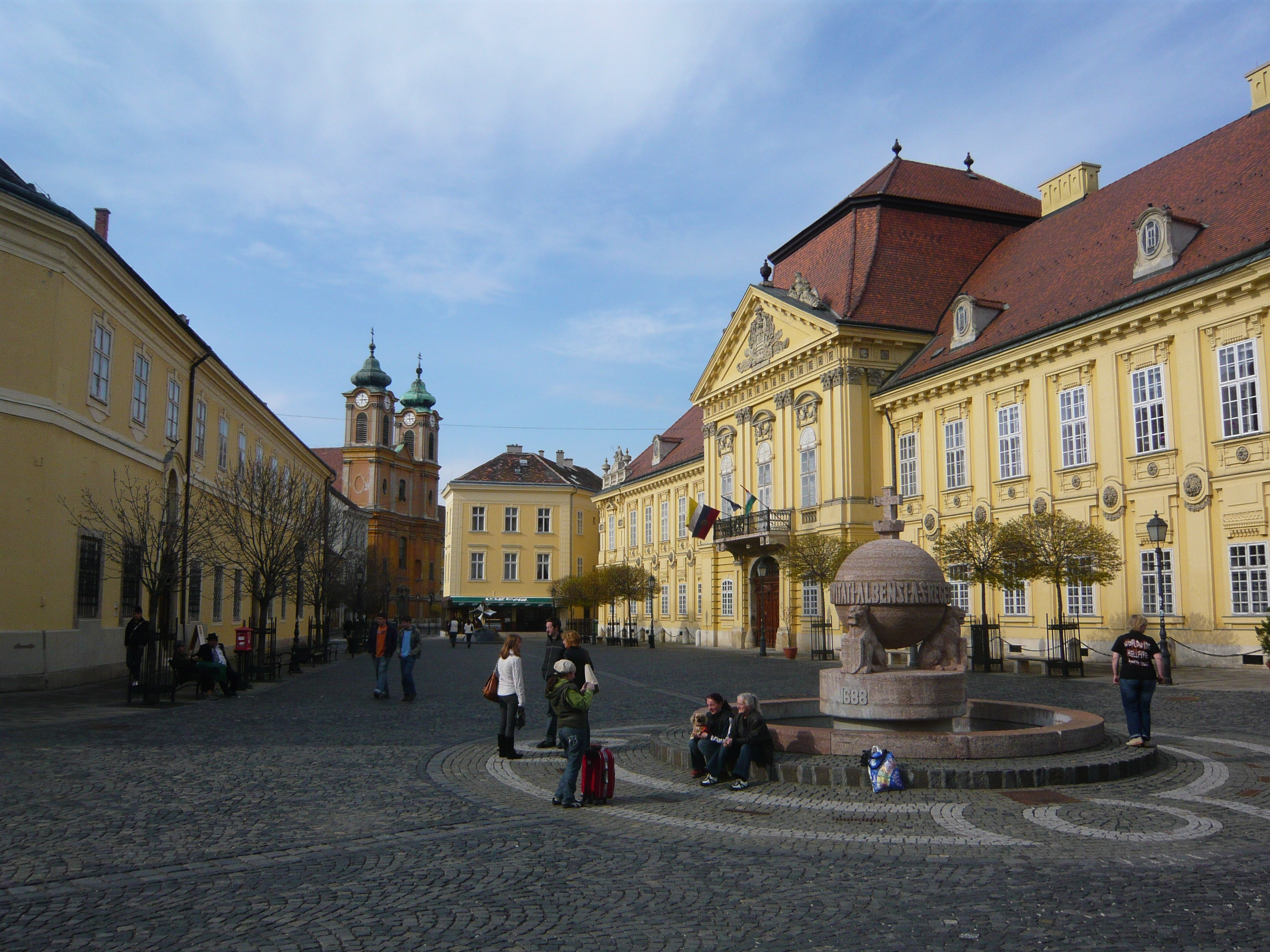 Varoshaz ter 市庁舎広場,Székesfehérvár,Hungary（セーケシュフェヘールヴァール,ハンガリー）でHide-spが撮影。